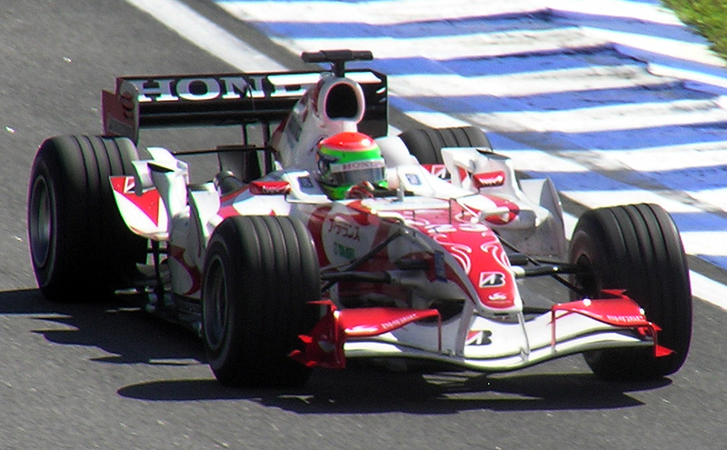 Formula One 2006 Rd.18 Interlagos: #23 Sakon Yamamoto (Super Aguri)